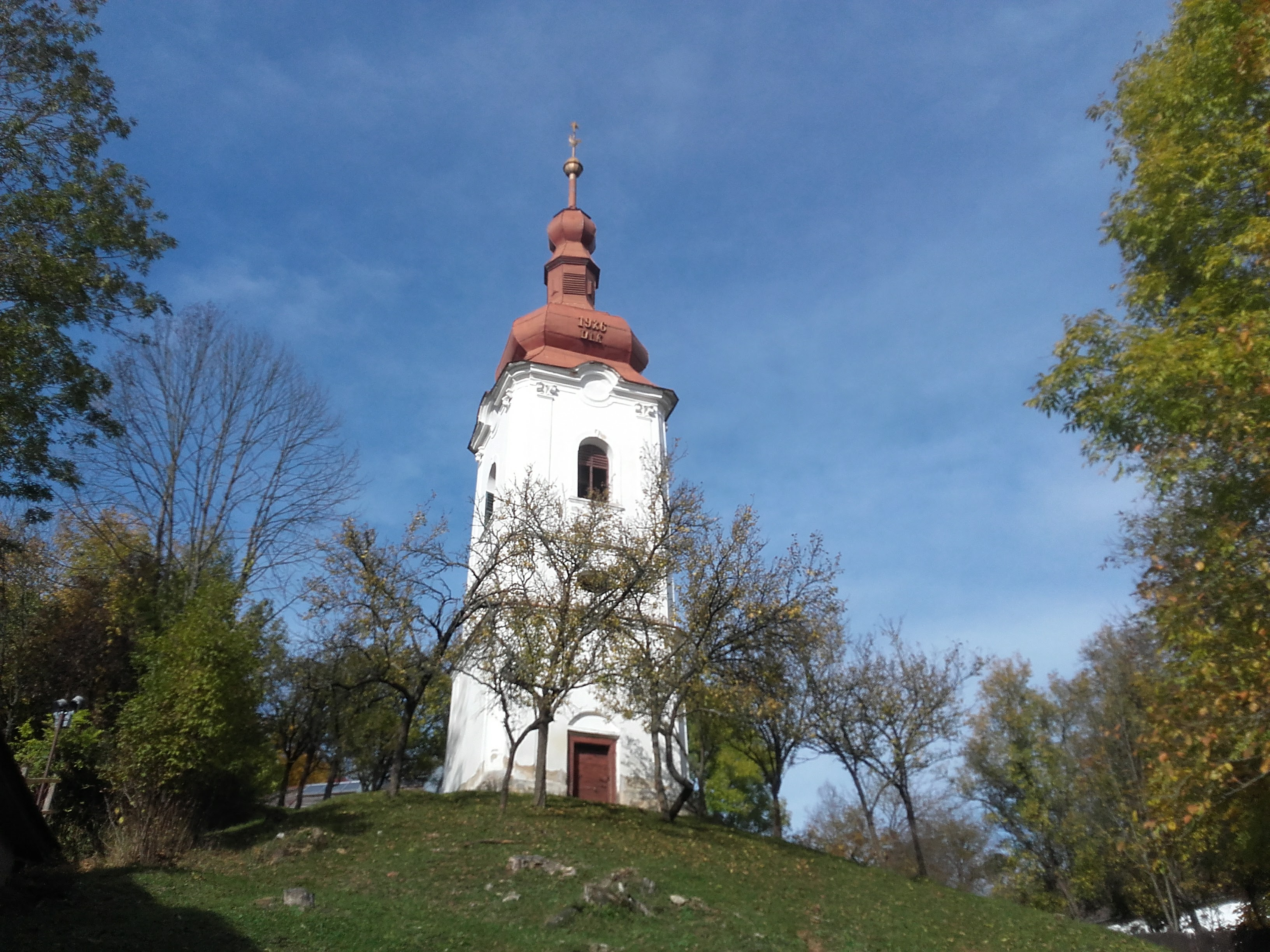 A 18. században épült barokk jósvafői református templom harangtornya This is a photo of a monument in Hungary. Identifier: 2818